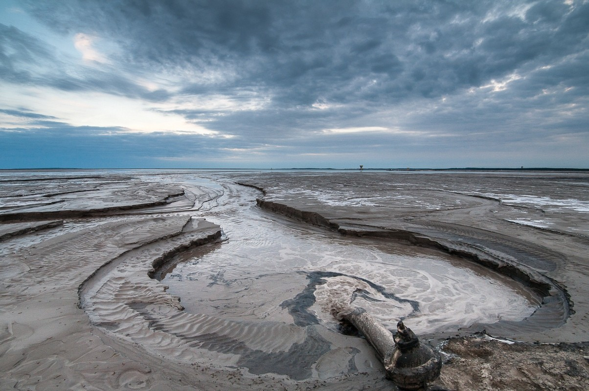 Składowisko odpadów powstałych podczas wzbogacania rud miedzi w KGHM.